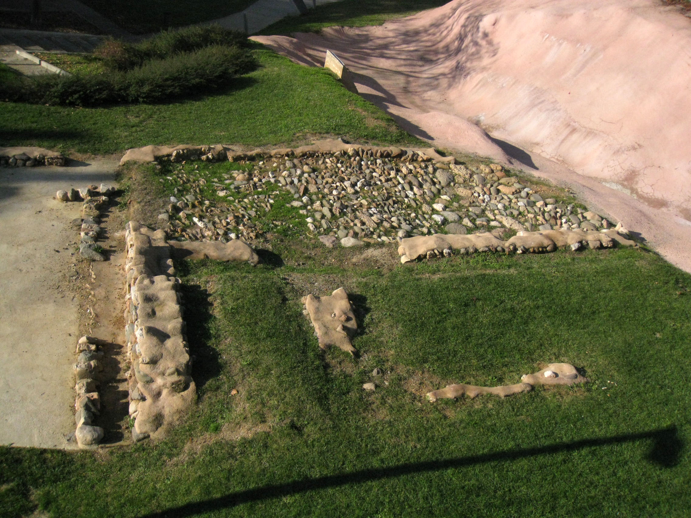 Restes arqueològiques vora el castell de Vallparadís (Terrassa)